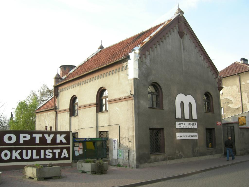 Synagoga w Mosinie/Synagogue de Mosina